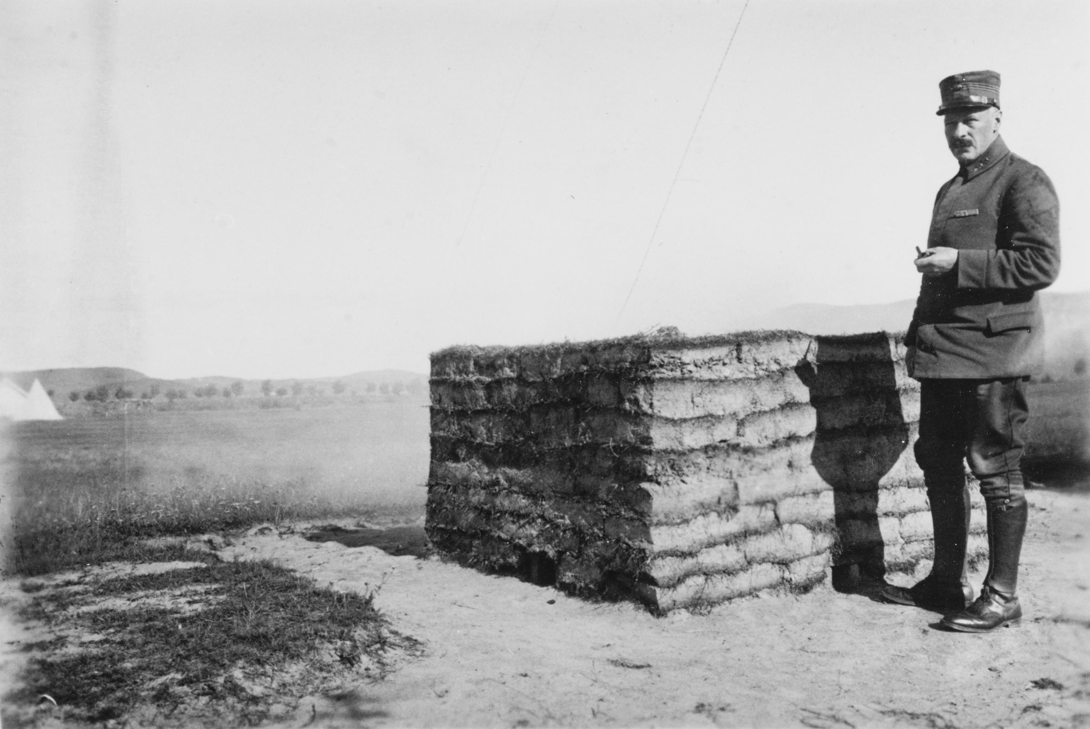 Trolig fotografert under første verdenskrig. Arkivref.: RAFA-5032_U1_3-1b.